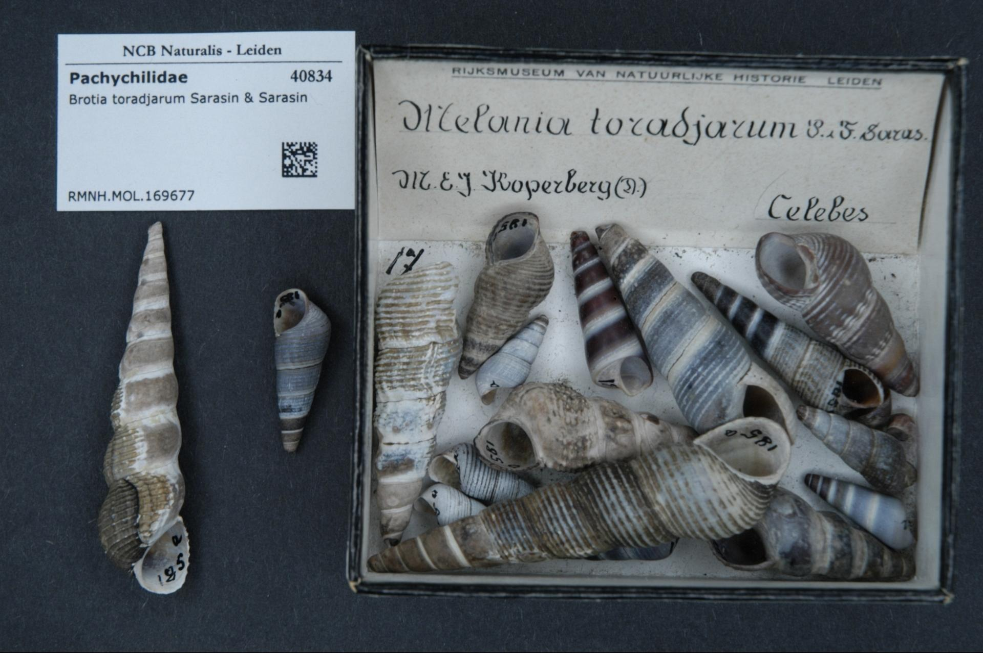 Tylomelania toradjarum, synonym: Brotia toradjarum (Sarasin & Sarasin, 1897)